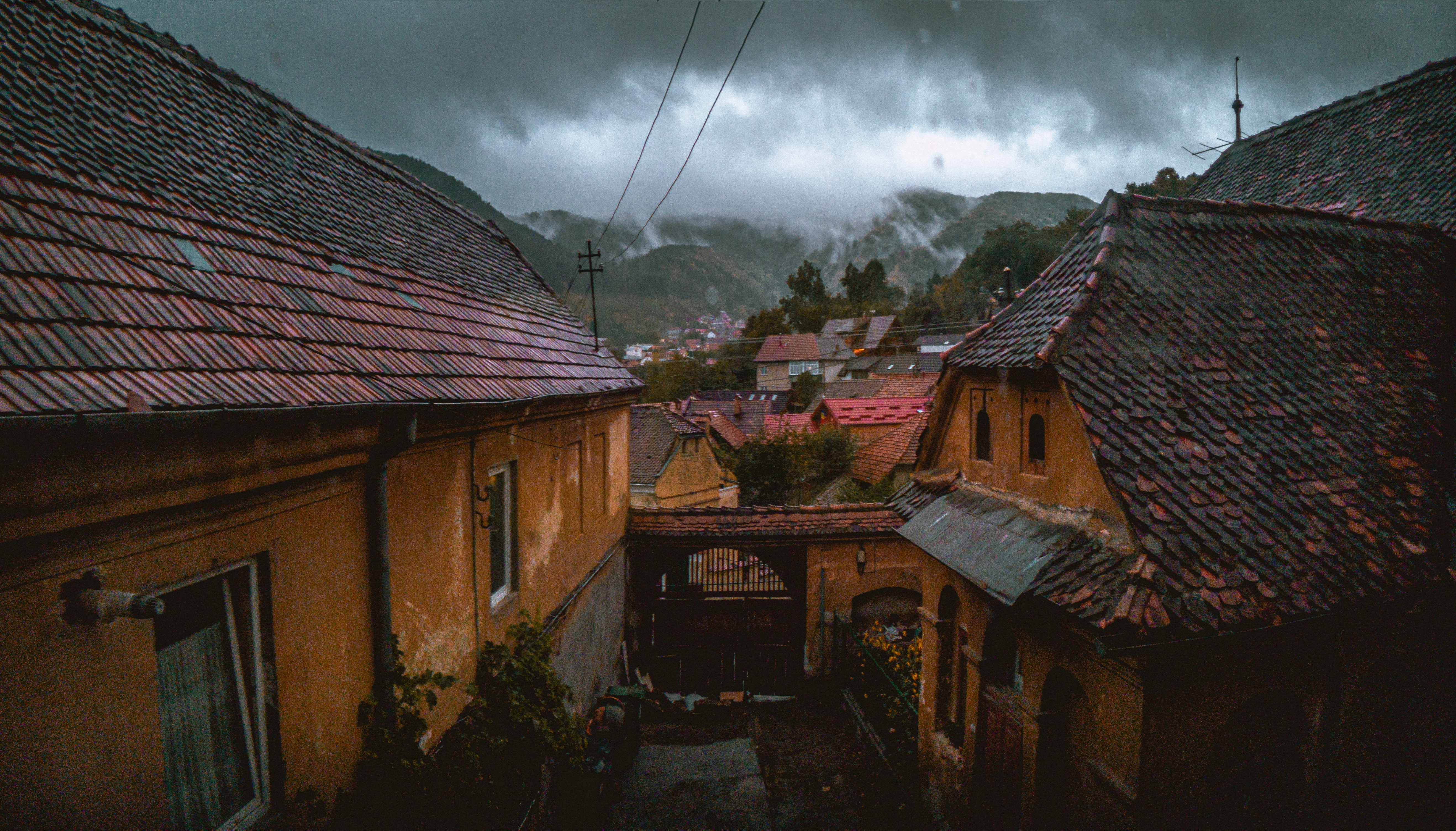 vedere din interiorul curții a casei de pe strada general traian mosoiu nr 2